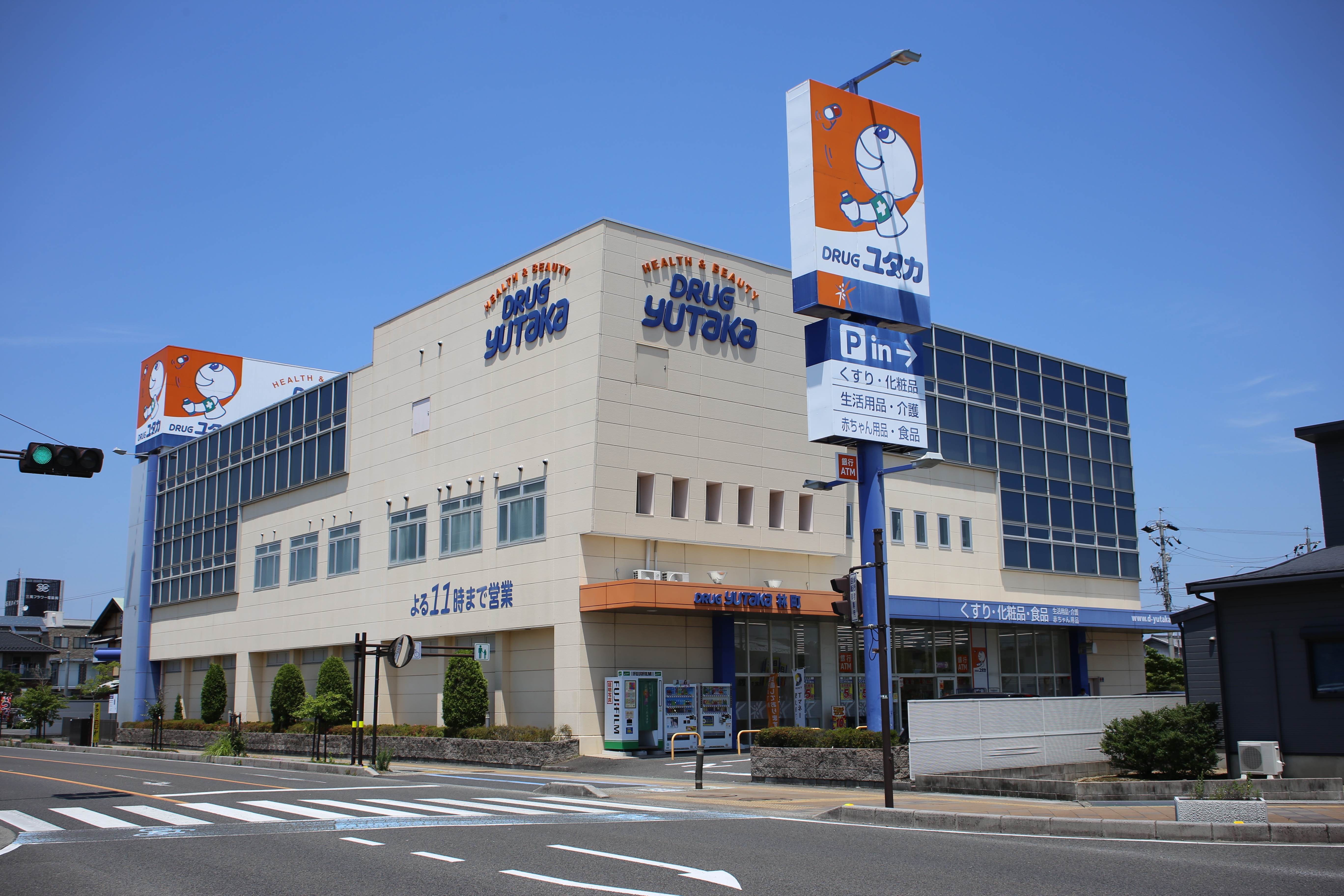 岐阜県大垣市林町のユタカファーマシー本社・ドラッグユタカ林町店を西側公道南側より撮影